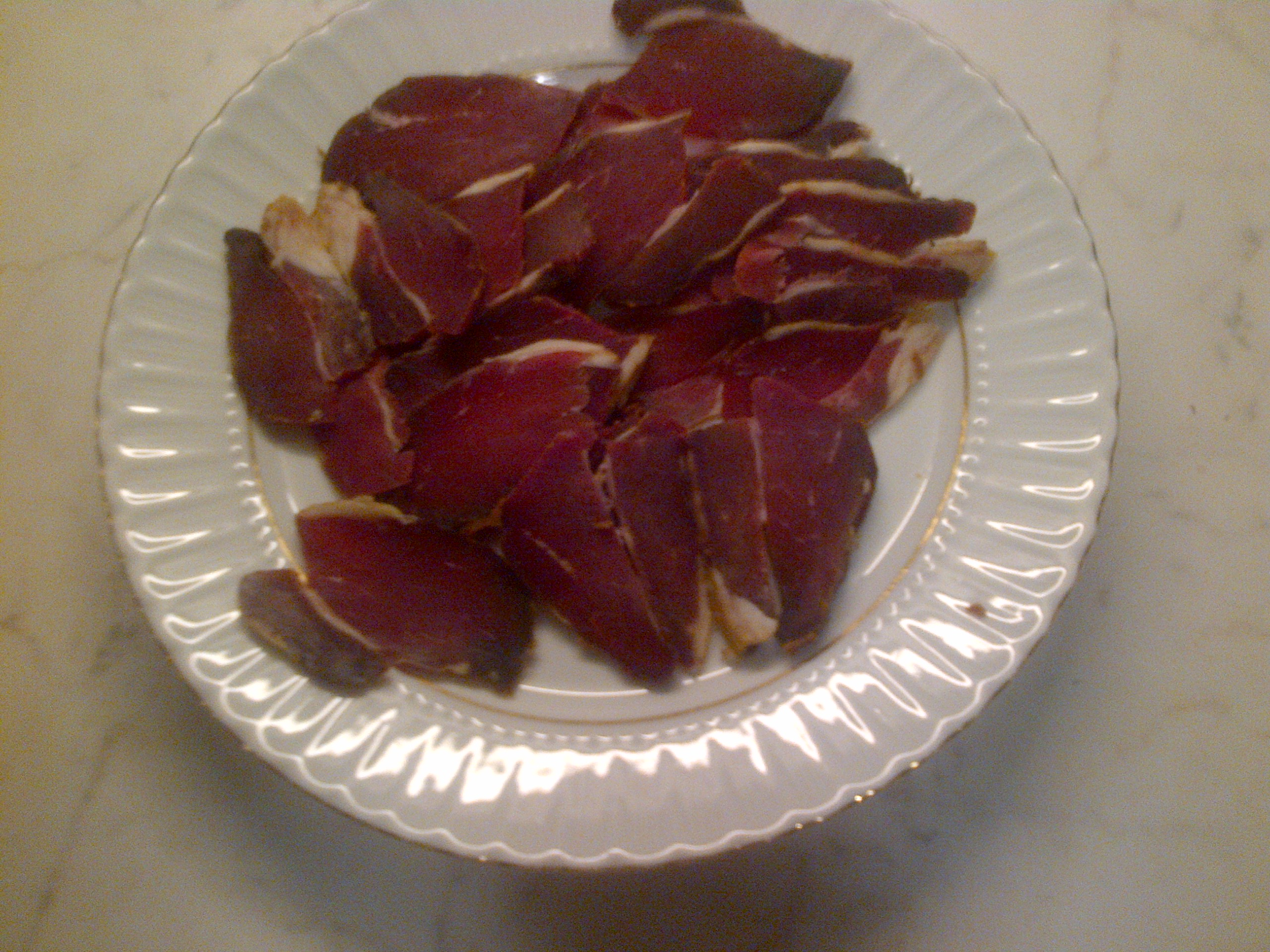 Pastırma de lomo (con poca grasa) de buena calidad de la ciudad turca de Kayseri.